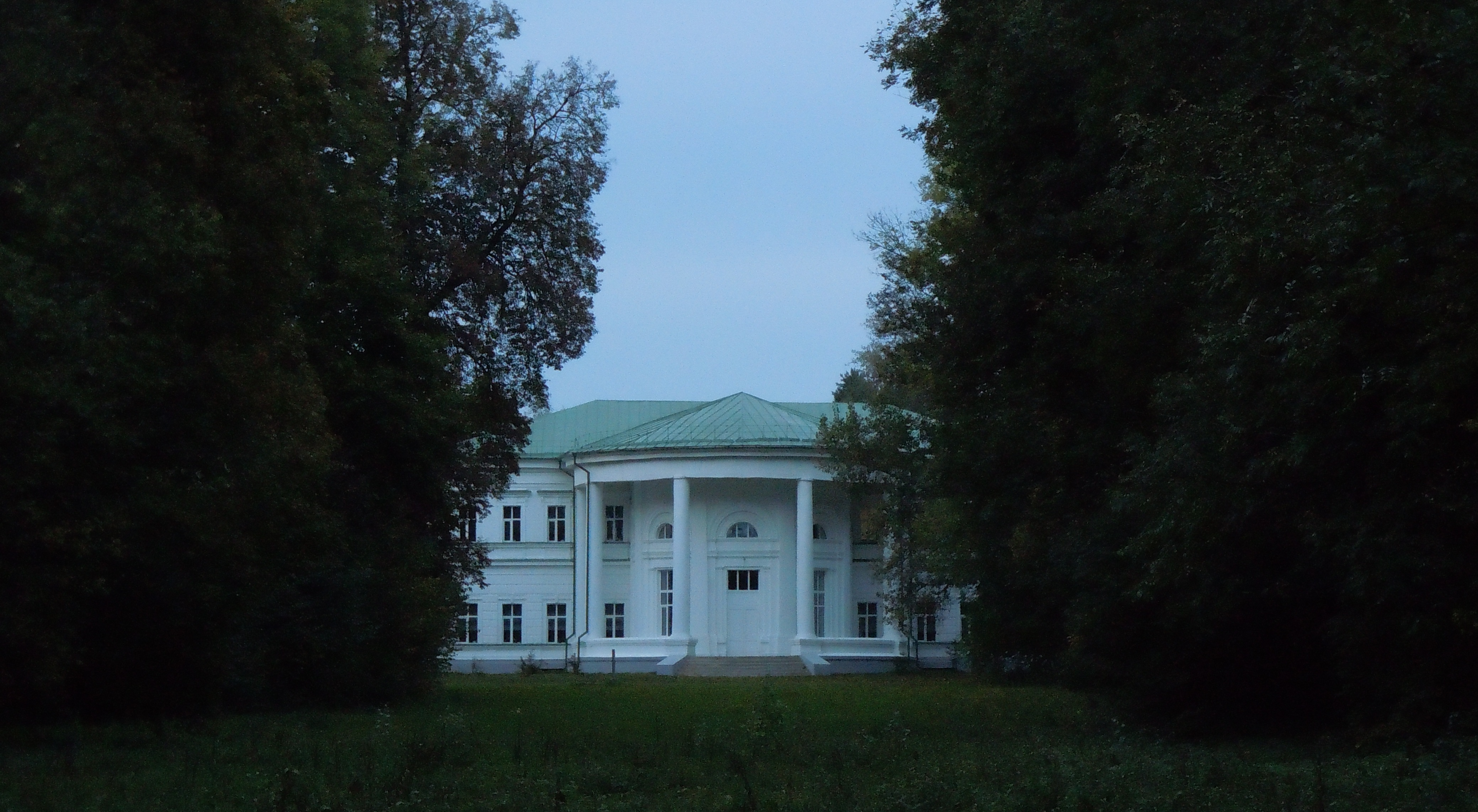 Палац княгині Львової у селі Бочечки (Конотопський район Сумської області)